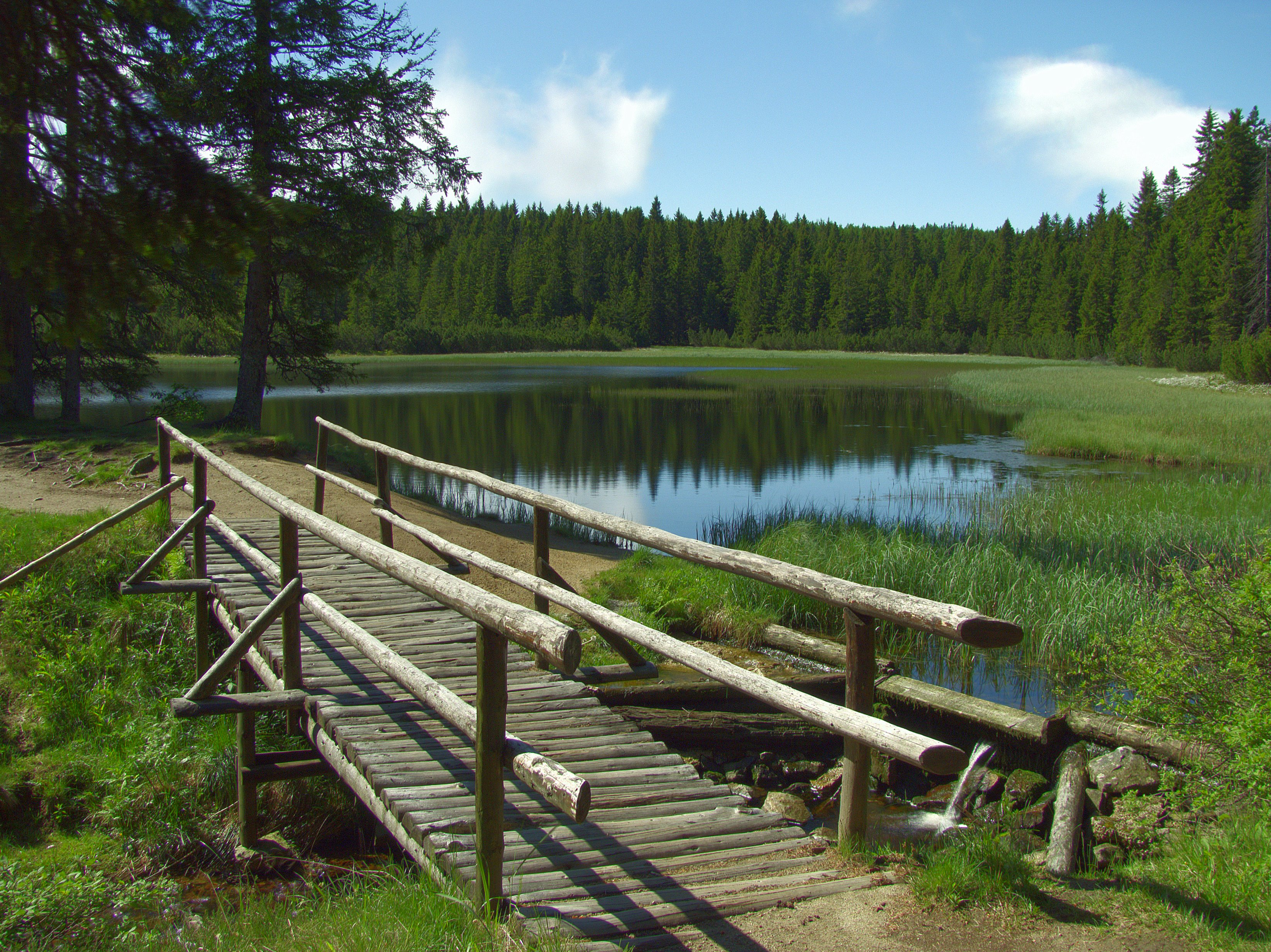 Most na Črnavi, Črno jezero